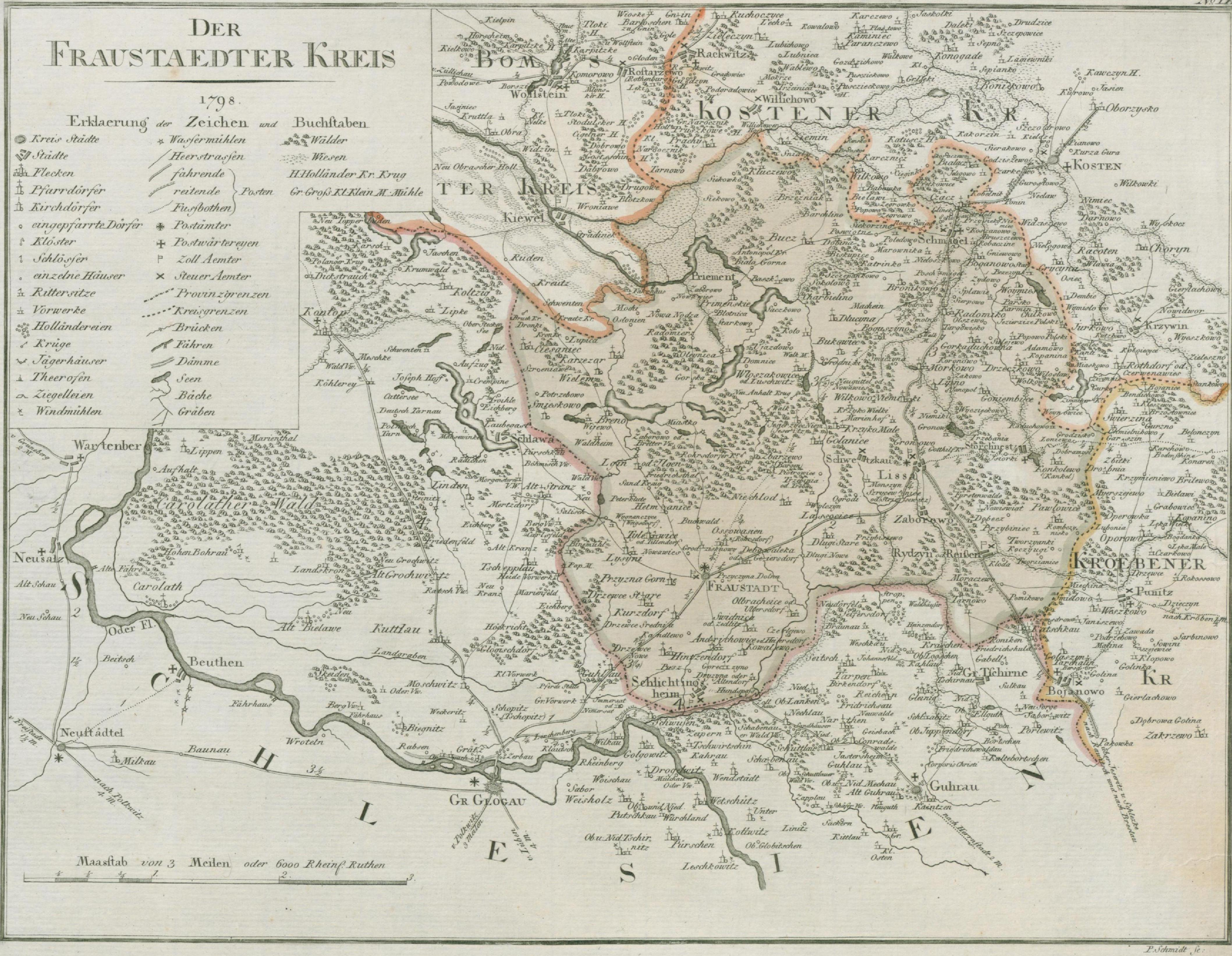 Map of "Kreis Fraustadt" as of 1798